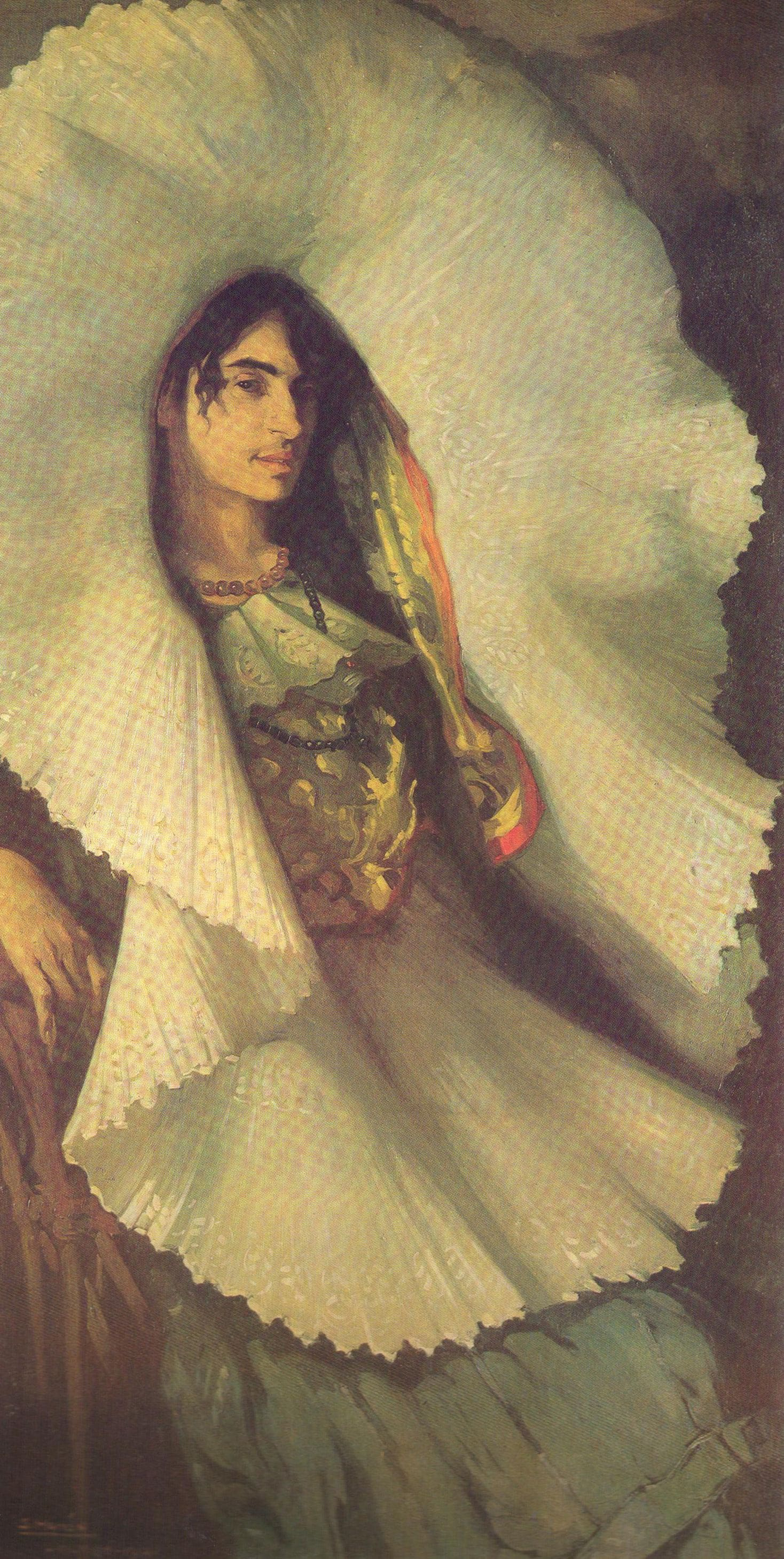 Saturnino Herran Mujer en Tehuantepec (1914).jpg: картина